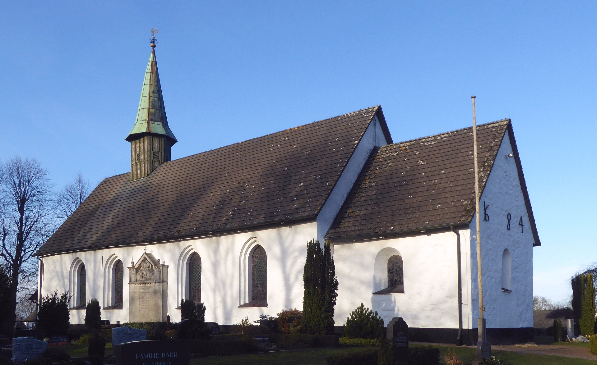 Tolk St-Marien-Kirche Feldsteinmauerwerk und Natursteinquadermauerwerk - Foto 2018 Wolfgang Pehlemann P1280505.jpg